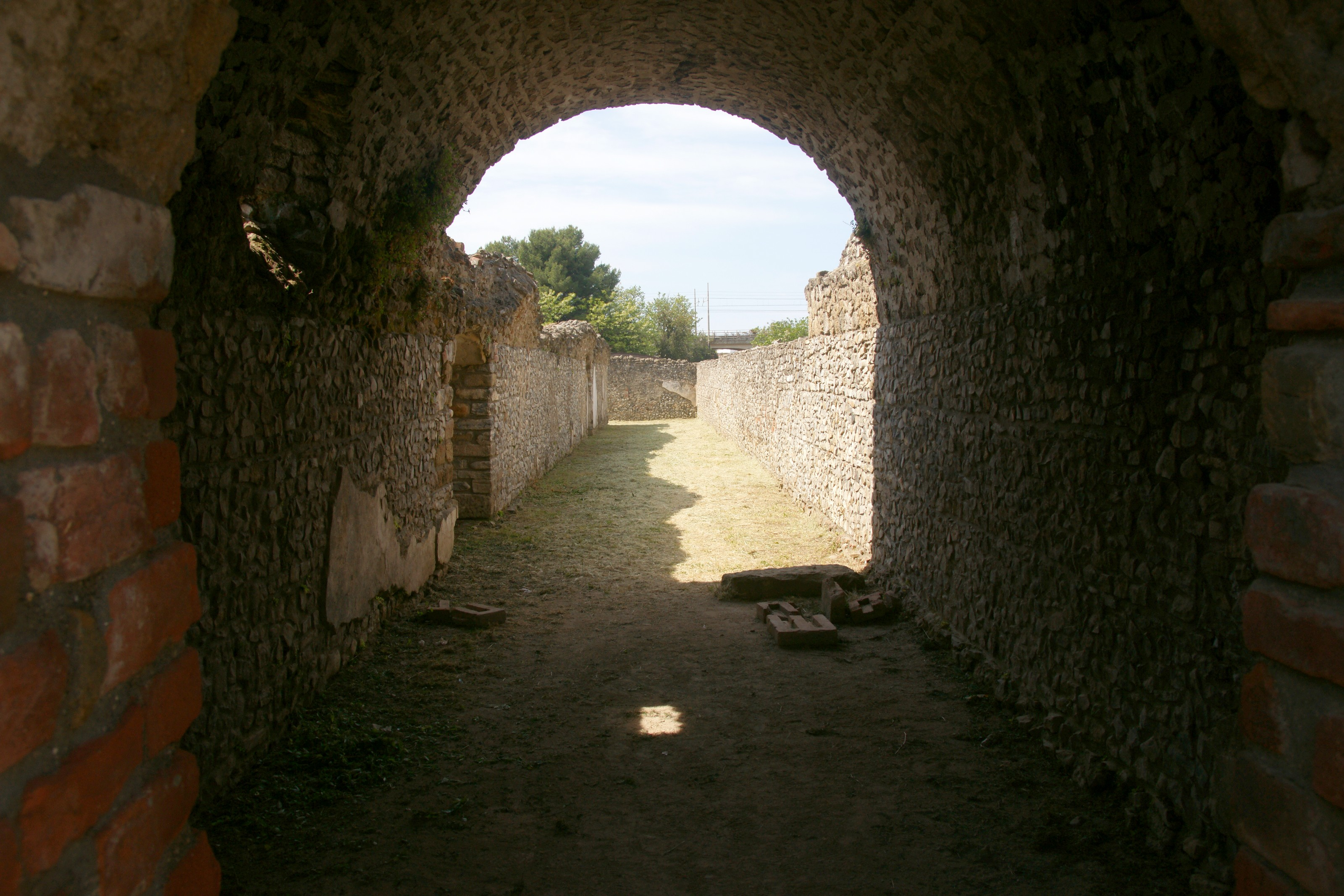 Elea - Velia: Durchgang im Haus mit dem Kryptoportikus